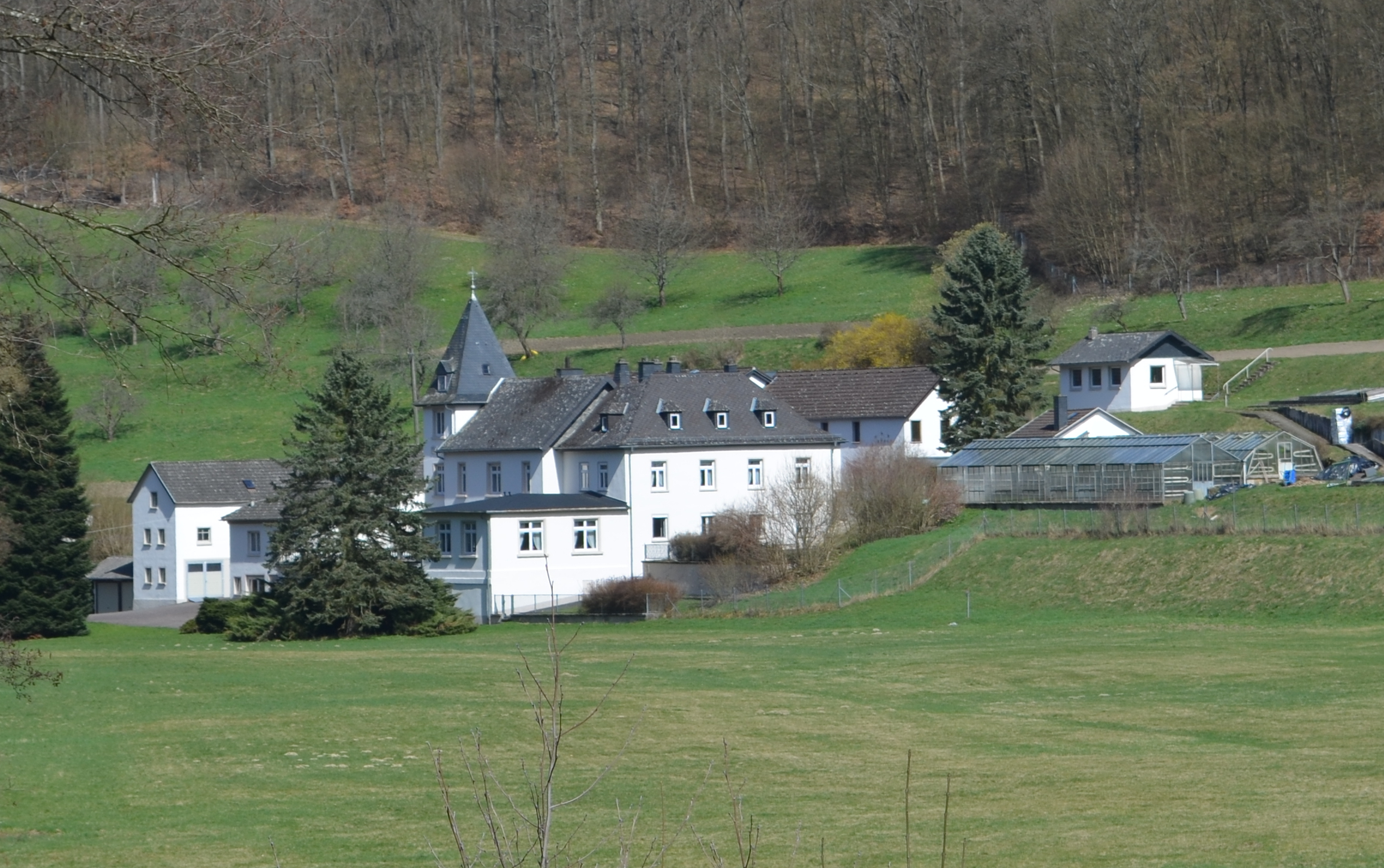 Neuweilnau, Haus Waldeck